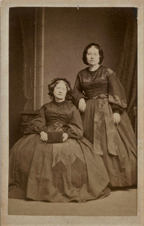 Carlotta Grisi (1819-1899) et Ernesta Grisi (1816-1895)